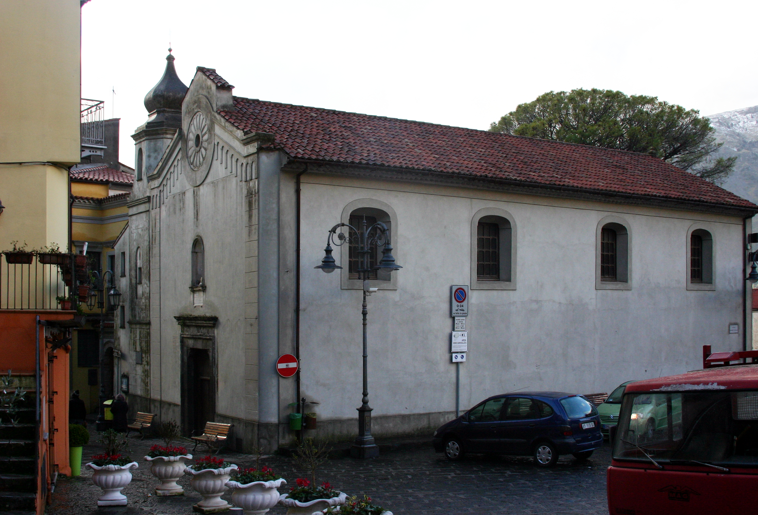 Maratea